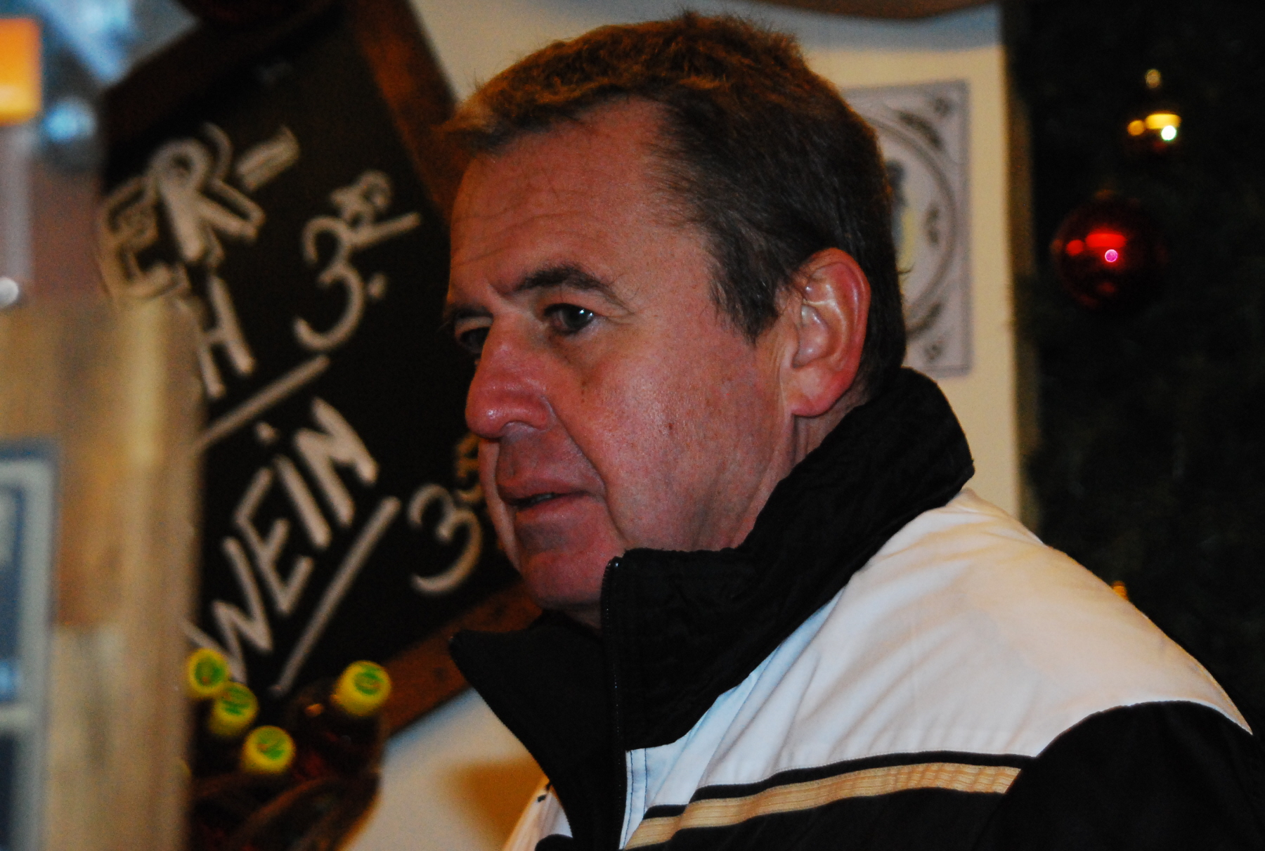 Radiomoderator Udo Huber von ORF - Radio Wien bei der Punschausschank zu Gunsten der Aktion "Licht ins Dunkel" auf dem Adventmarkt Am Hof in Wien-Innere Stadt.